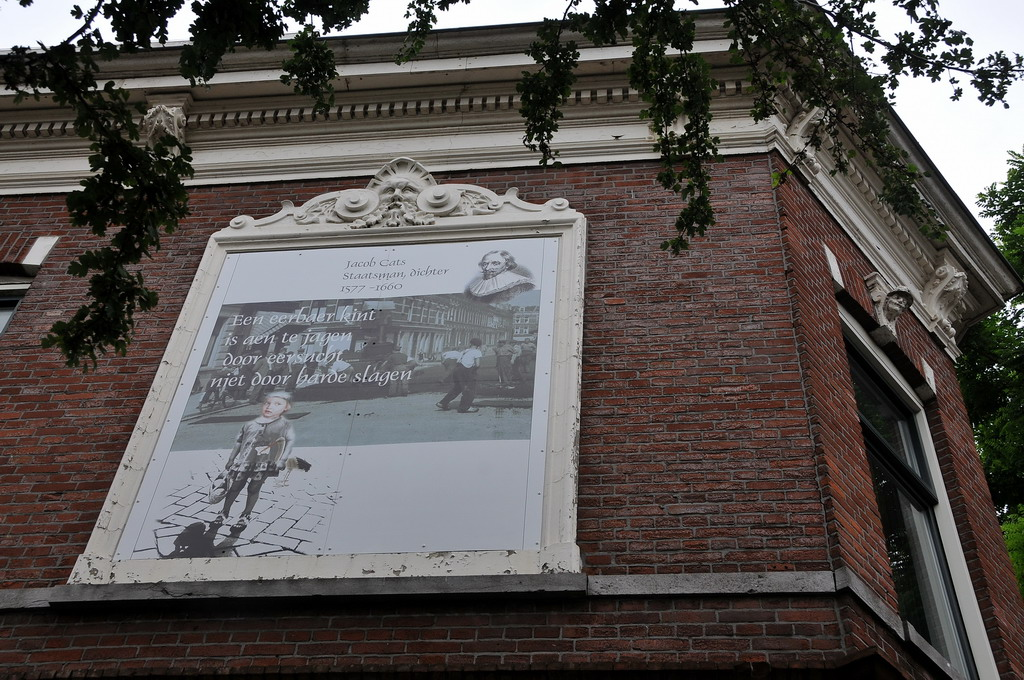 'Een eerbaer kint is aen te jagen door eersucht niet door harde slagen'. Jacob Cats, Staatsman, dichter 1577-1660